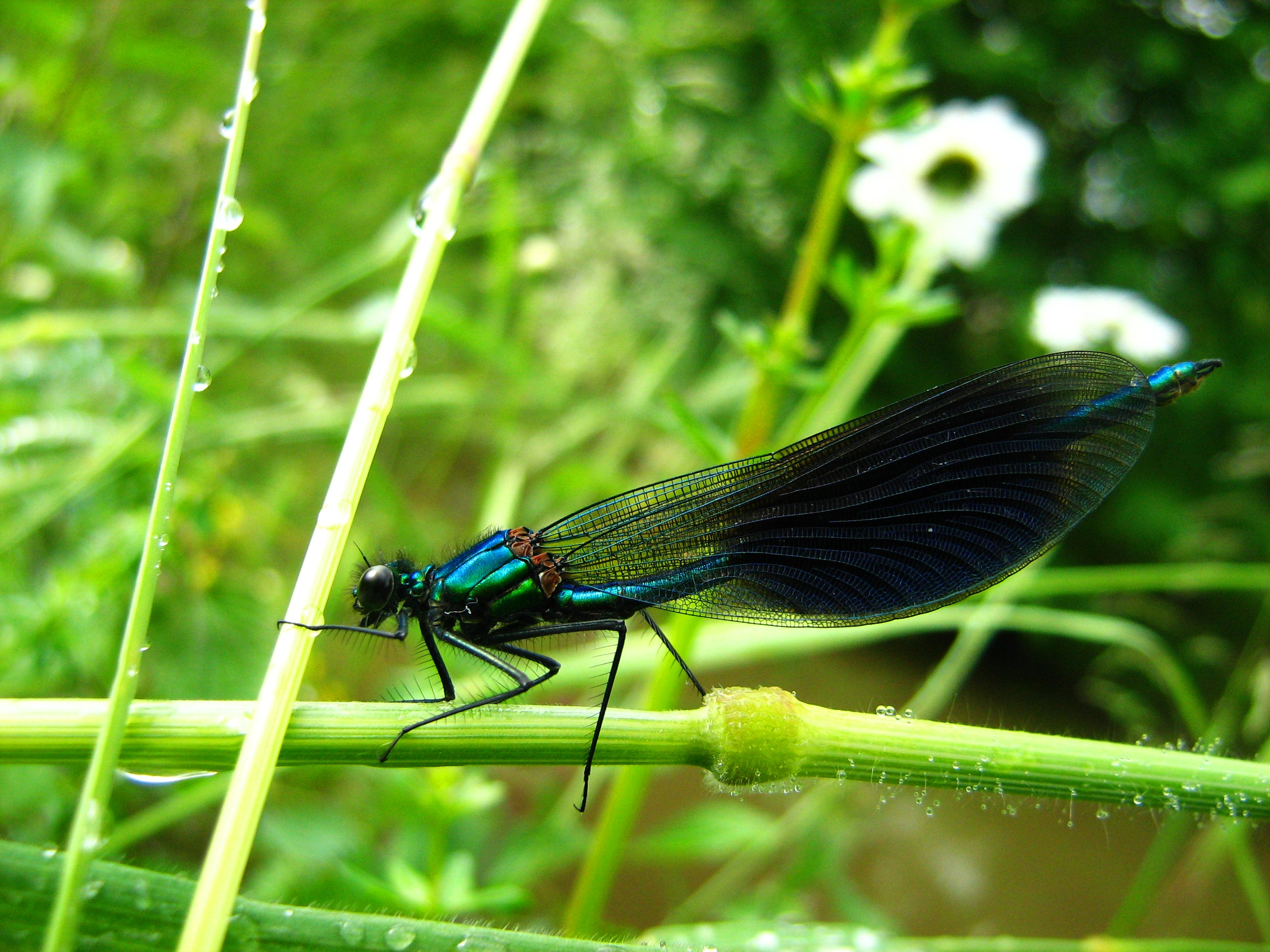 Calopteryx mâle, aux ailes partiellement teintées.